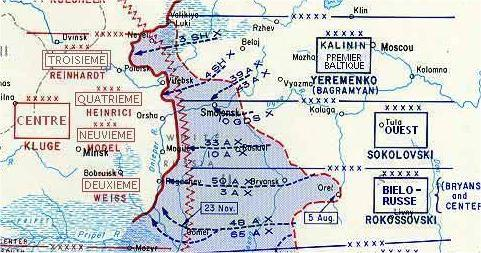 Détail de la carte des offensives soviétiques de 1943 Source : Traduction de la carte de la Wikipédia anglophone (voir carte originale [1])